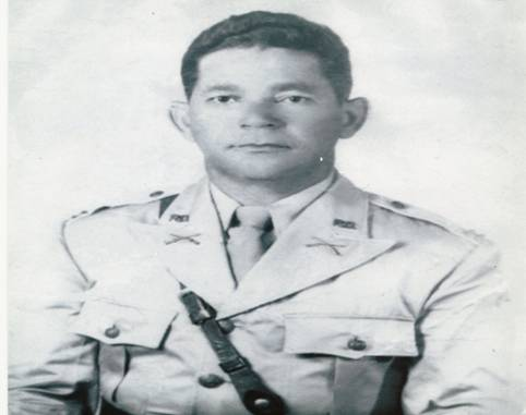 foto